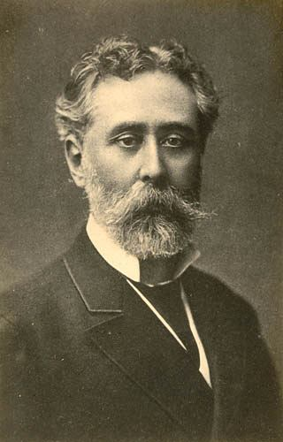 Presidente argentino, Manuel Quintana.